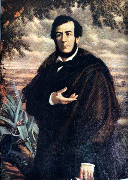 Retrato del escritor argentino Esteban Echeverría